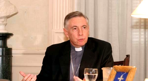 SER Héctor Aguer, 7º arzobispo de La Plata y 9º en la sucesión de la sede